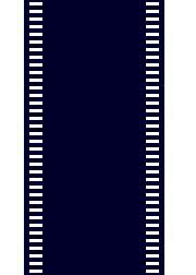 nu de correcte, door mij gemaakte tekening van het lint